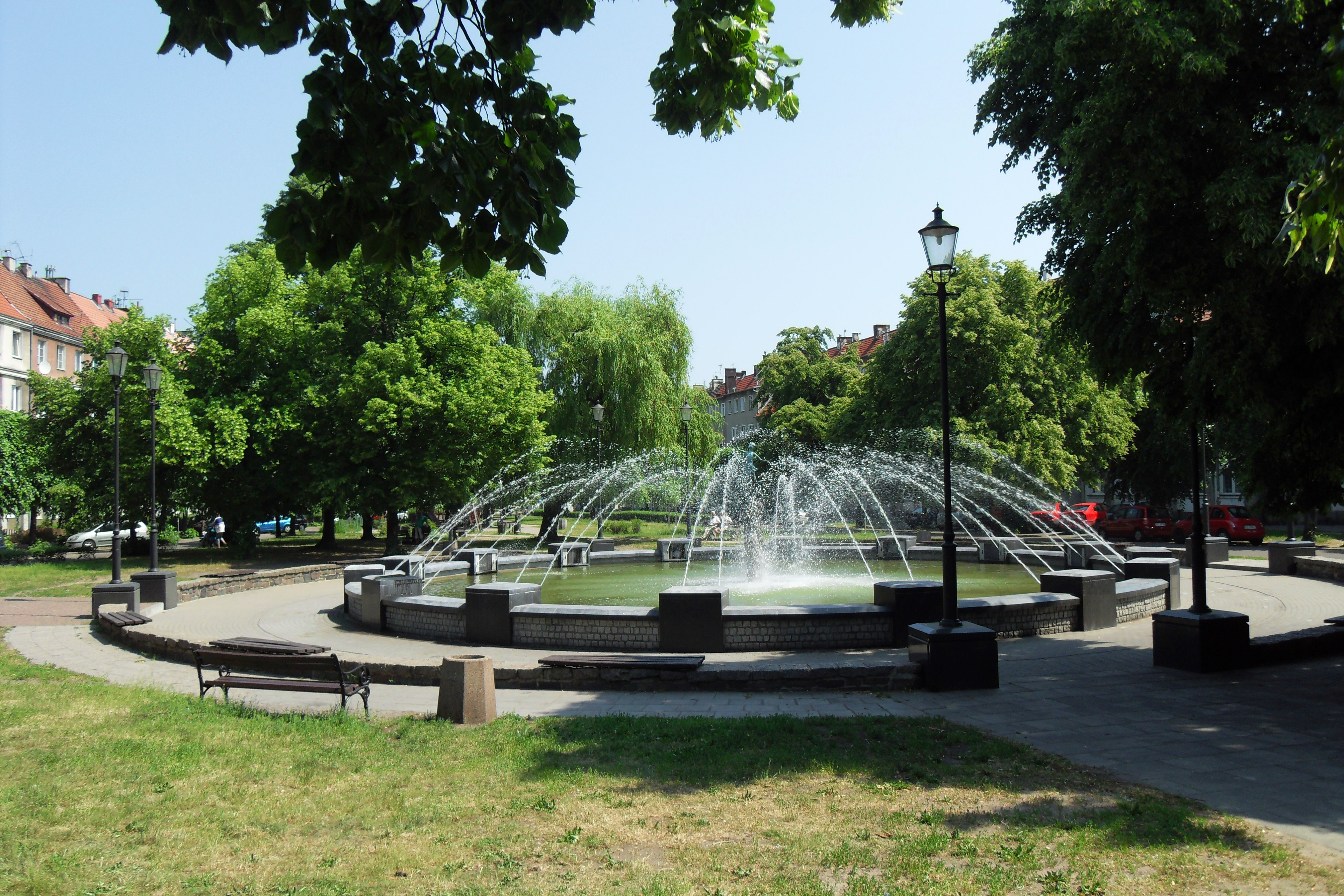 Gdańsk Wrzeszcz. Fontanna na placu Wybickiego.